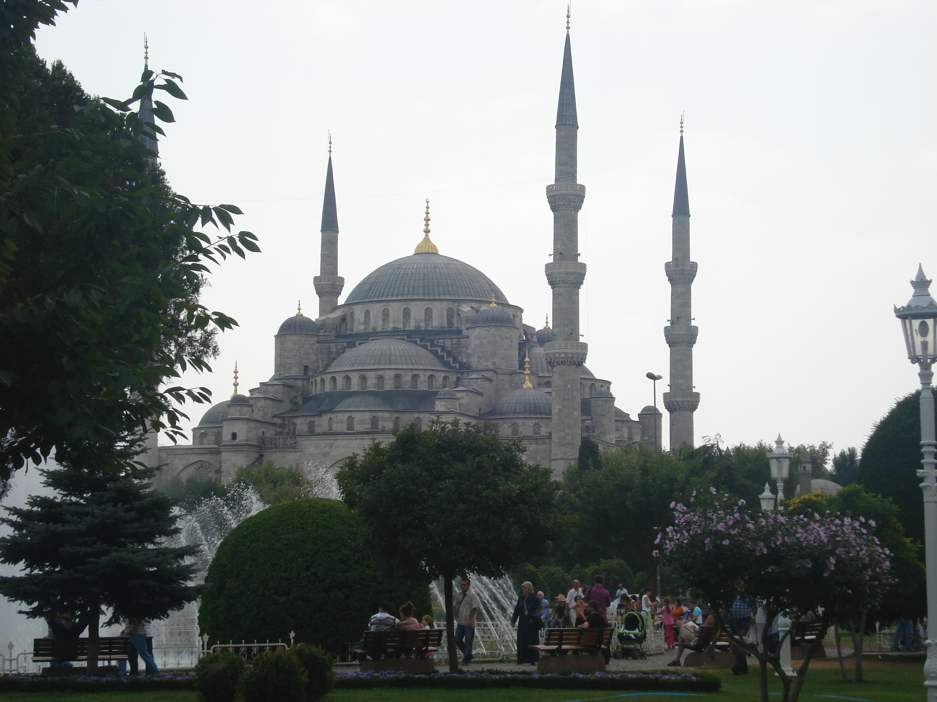 Sultanahmet Camii in İstanbul